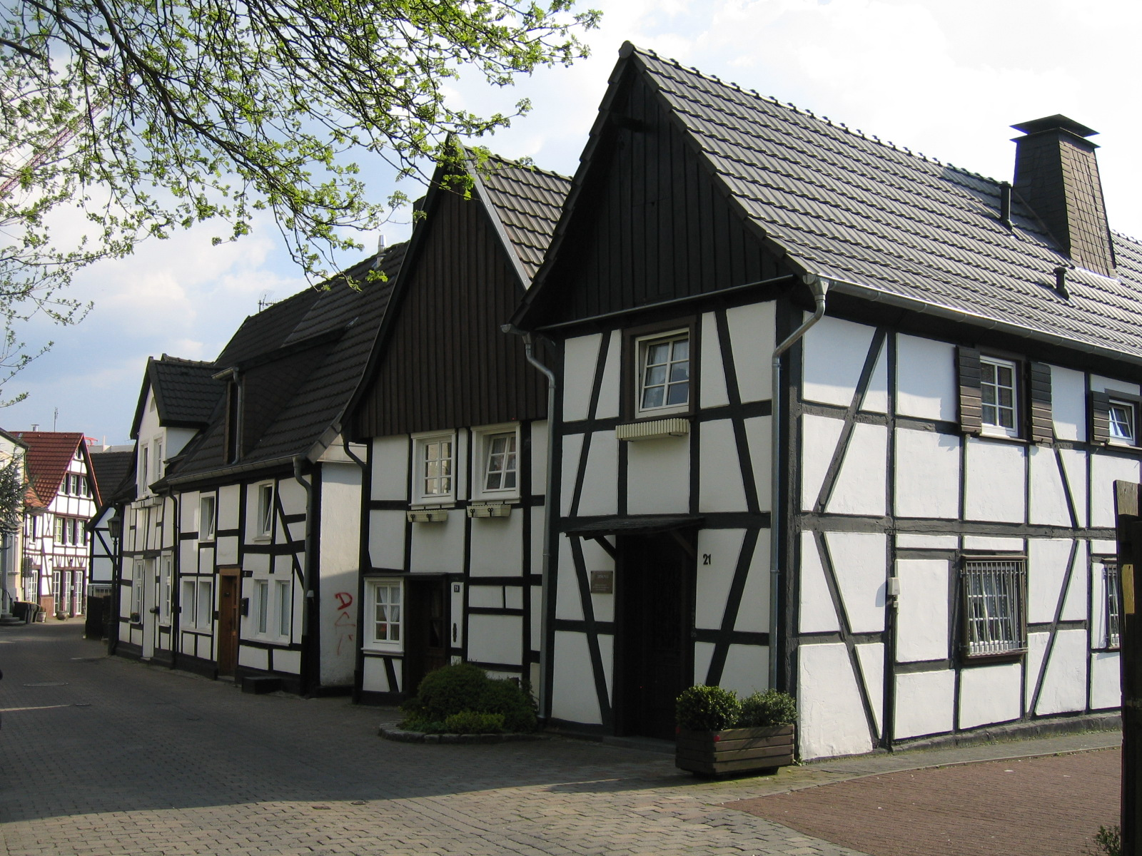 Description: Unter Denkmalschutz stehende Kleinbürgerhauszeile in Menden (Sauerland). Im Rahmen der Wallbebauung ab 1723 entstanden. Source: selbst fotografiert Date: 25. Apr. 2006 Author: Asio otus